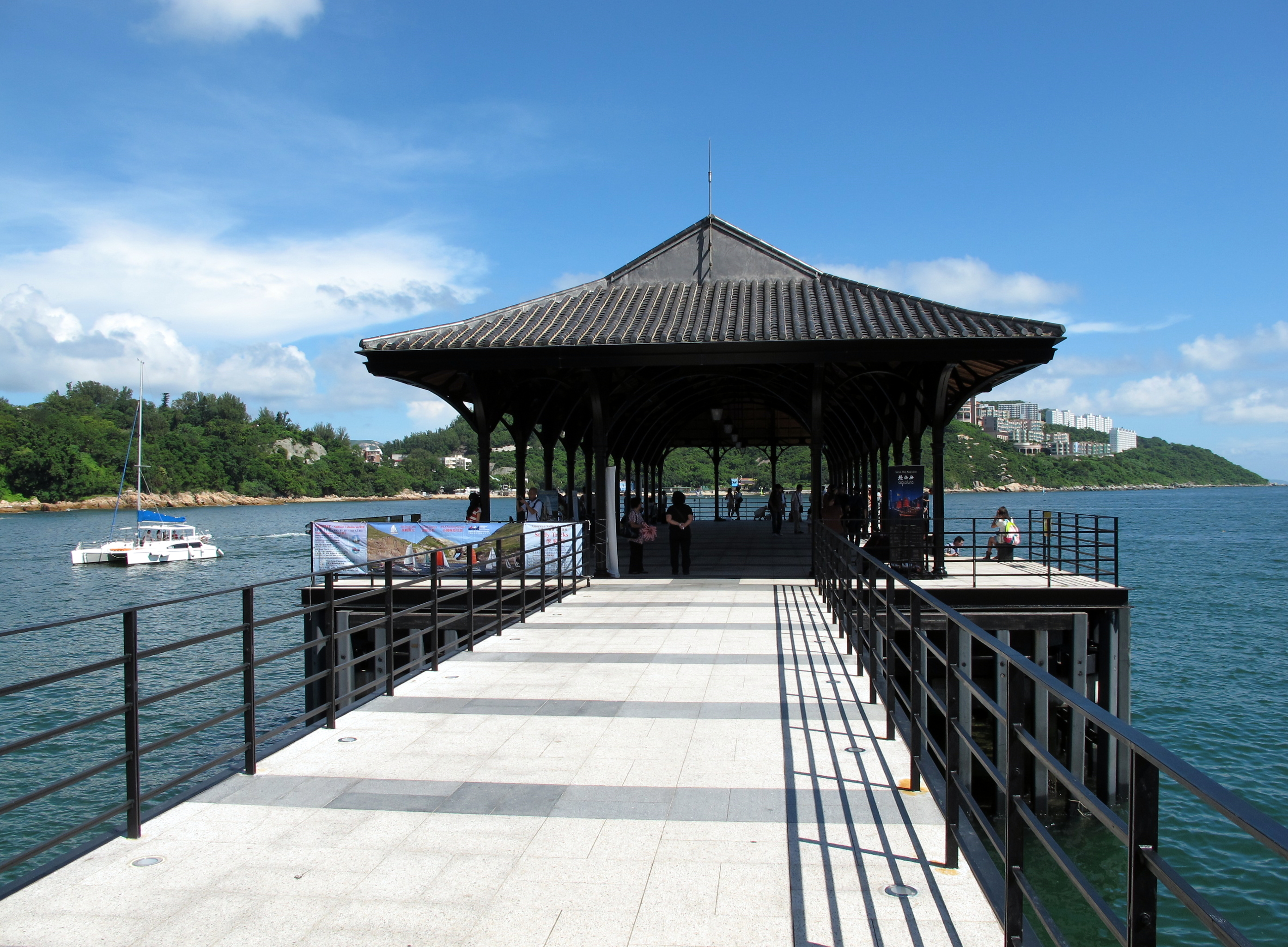 Blake Pier at Stanley 赤柱卜公碼頭